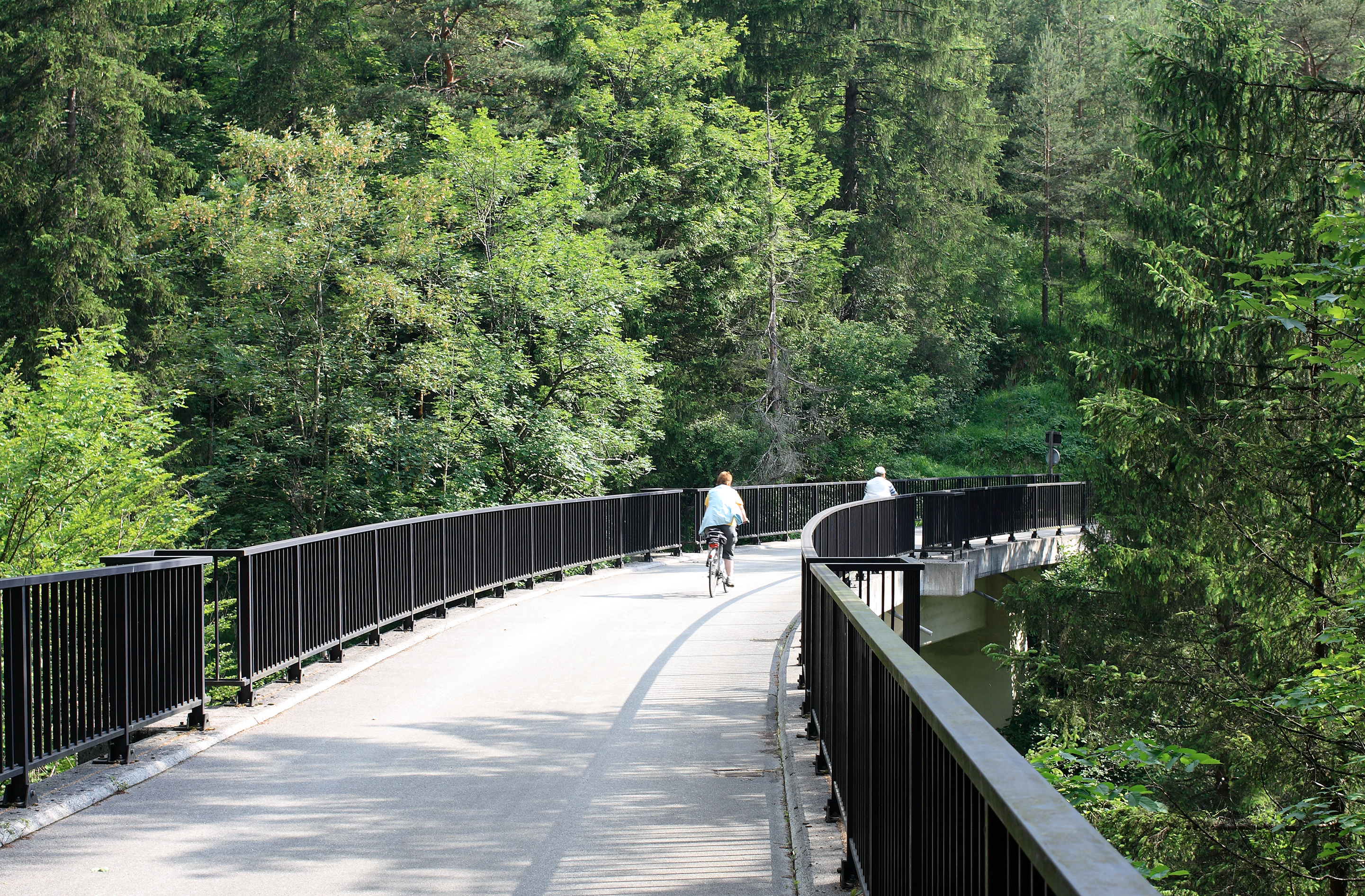 Die Plangrabenbrücke des Steyrtalradweges